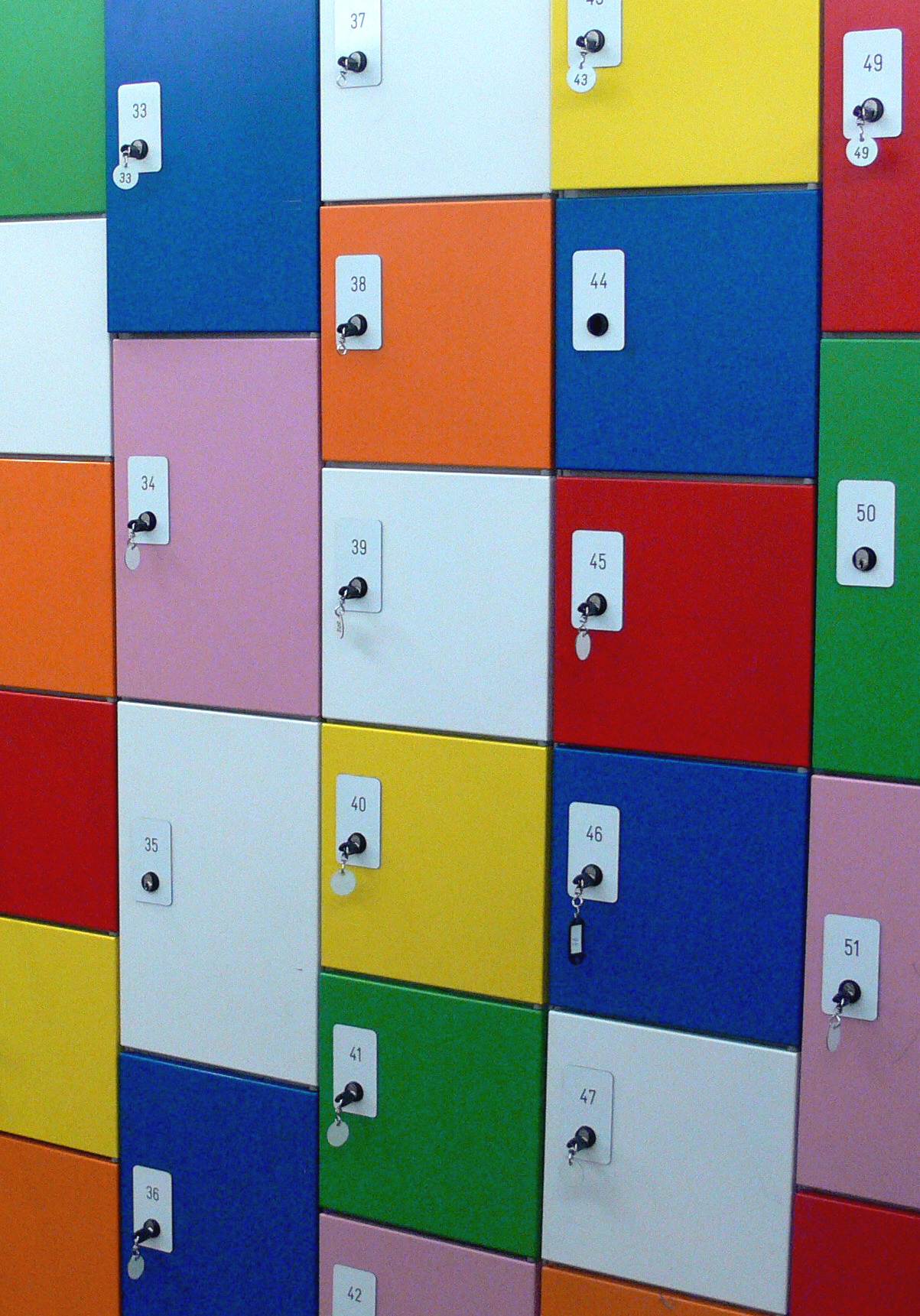 Lockers/Bagagekluizen Tropenmuseum Amsterdam